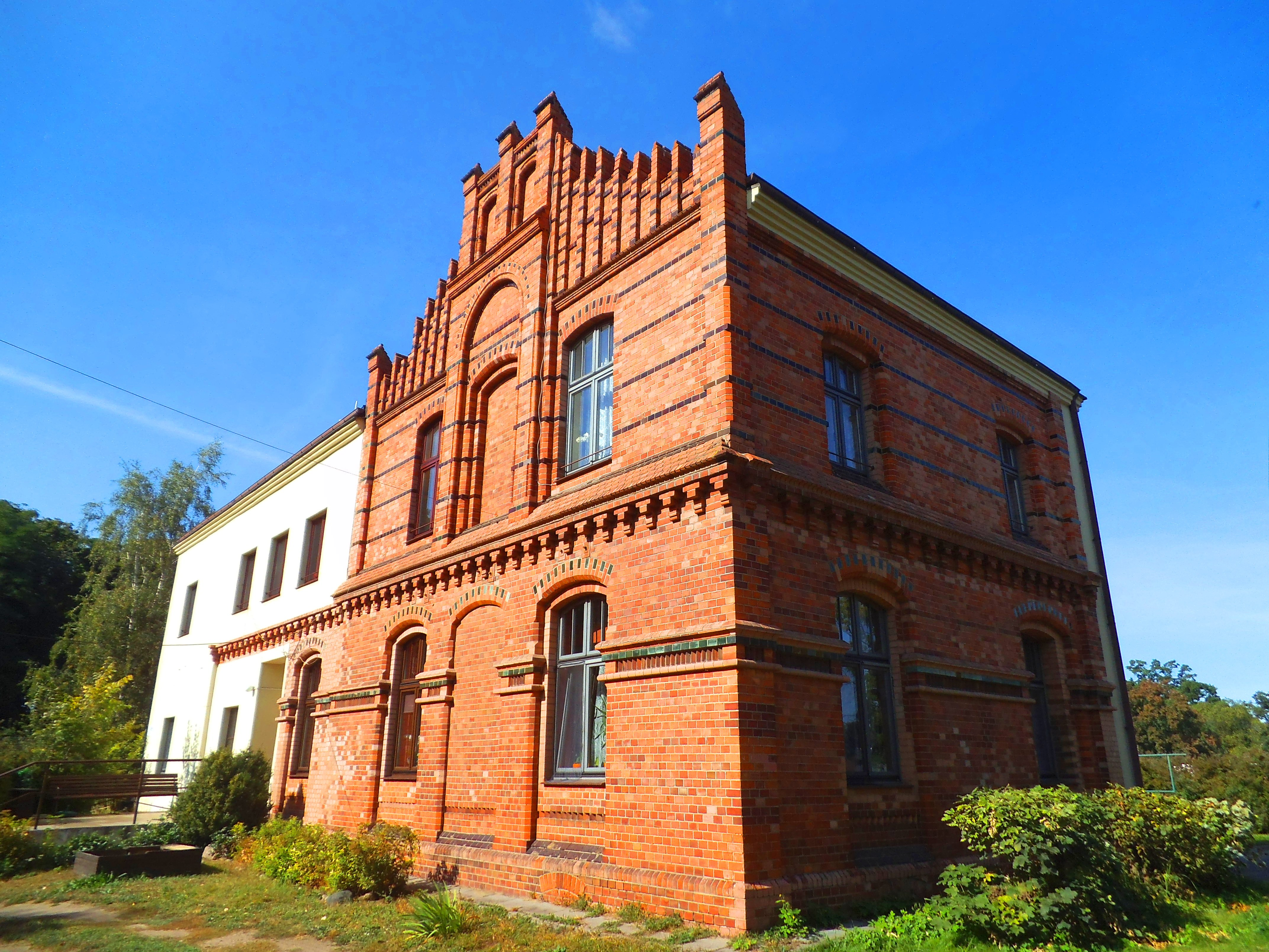 Dwór z XVIII wieku (folwark biskupów włocławskich) w Toruniu5